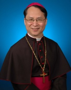 中文（台灣）: 天主教新竹教區李克勉主教